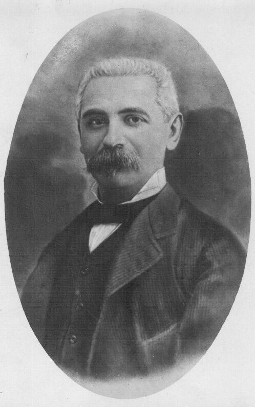 Foto di Antonio Cafaro (1845 – 1919).